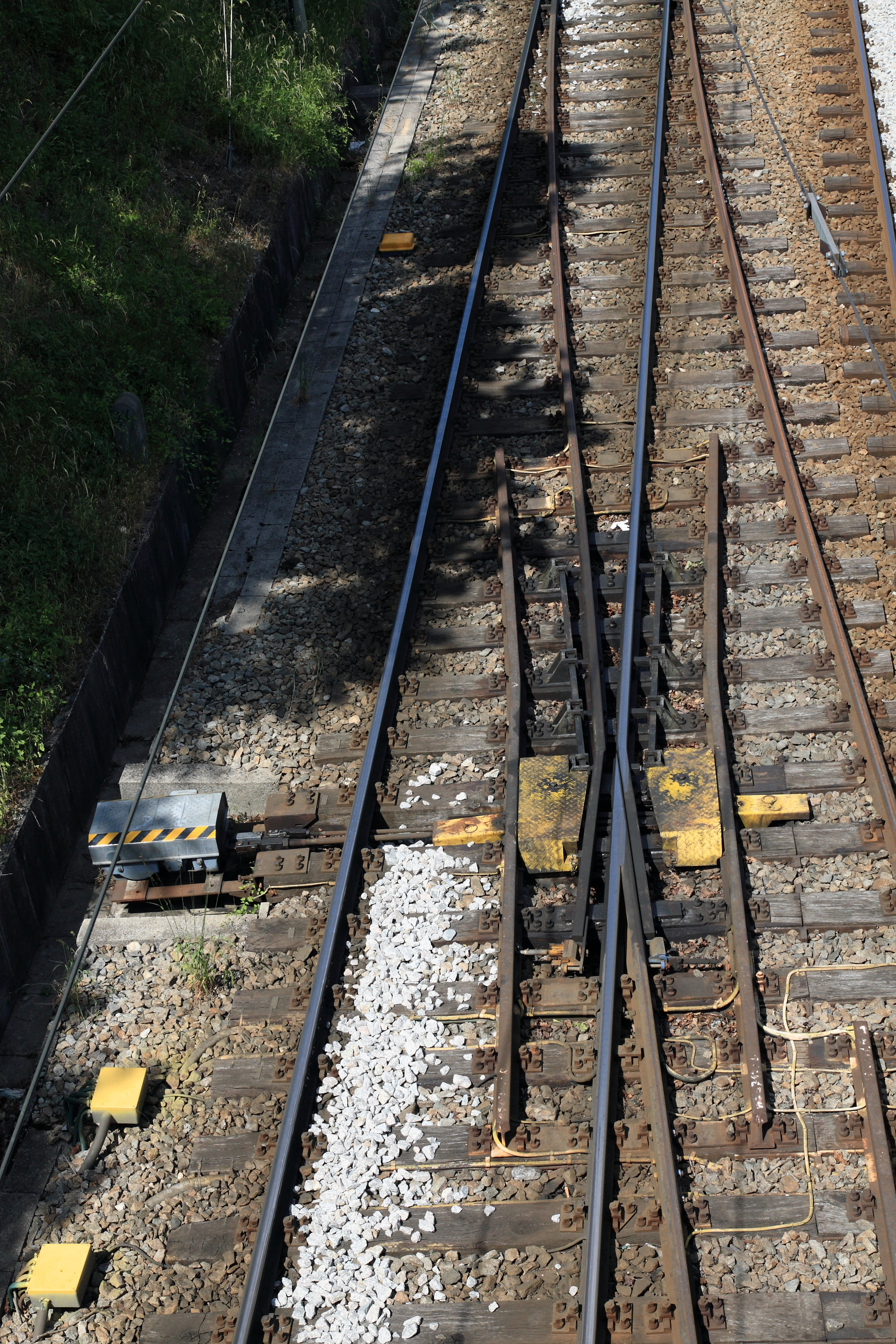 Überleitstelle Schedifkaplatz, an dieser Stelle sind die beweglichen Flügelschienen eigentlich nicht nötig, vor dem folgenden engen Bogen liegt der Wechsel zum Straßenbahnbetrieb und die Rillenschienen sind mit Fernbahnfahrzeugen ohnehin nicht zu befahren. Eventuell für den Einsatz von Baumaschinen?Unter den gelben Riffelblechabdeckungen liegen die Winkelhebel für die Verschlussschieber.